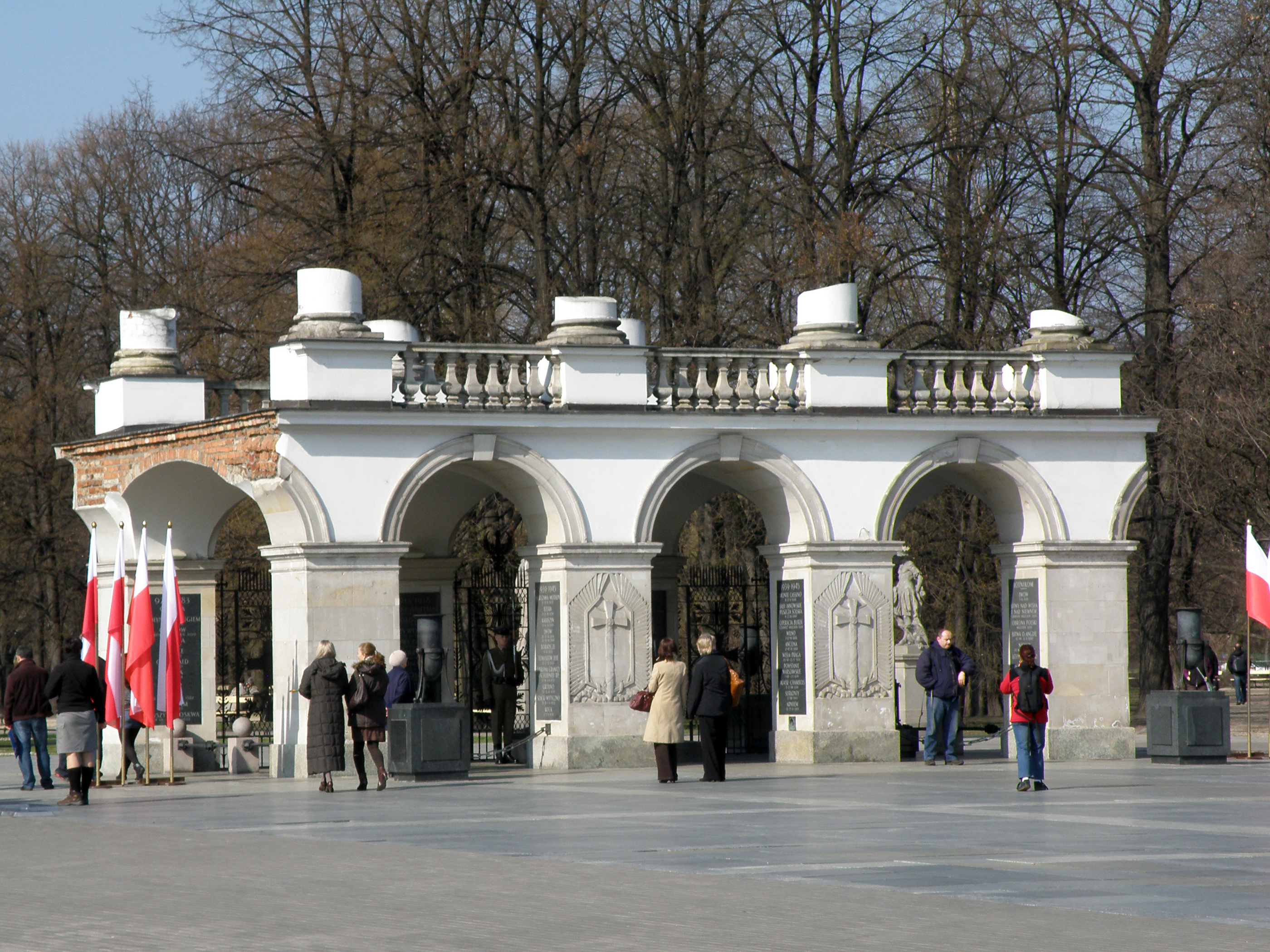 Grób Nieznanego Żołnierza w Warszawie